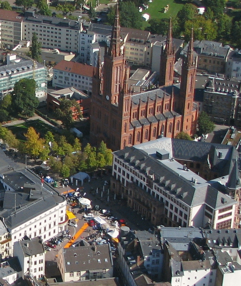 Luftbild Schlossplatz mit Marktbrunnen in Wiesbaden, vorne altes Rathaus links Stadtschloss richts neues Rathaus hinten Marktkirche Foto 2008 Wolfgang Pehlemann Wiesbaden DSCN8942